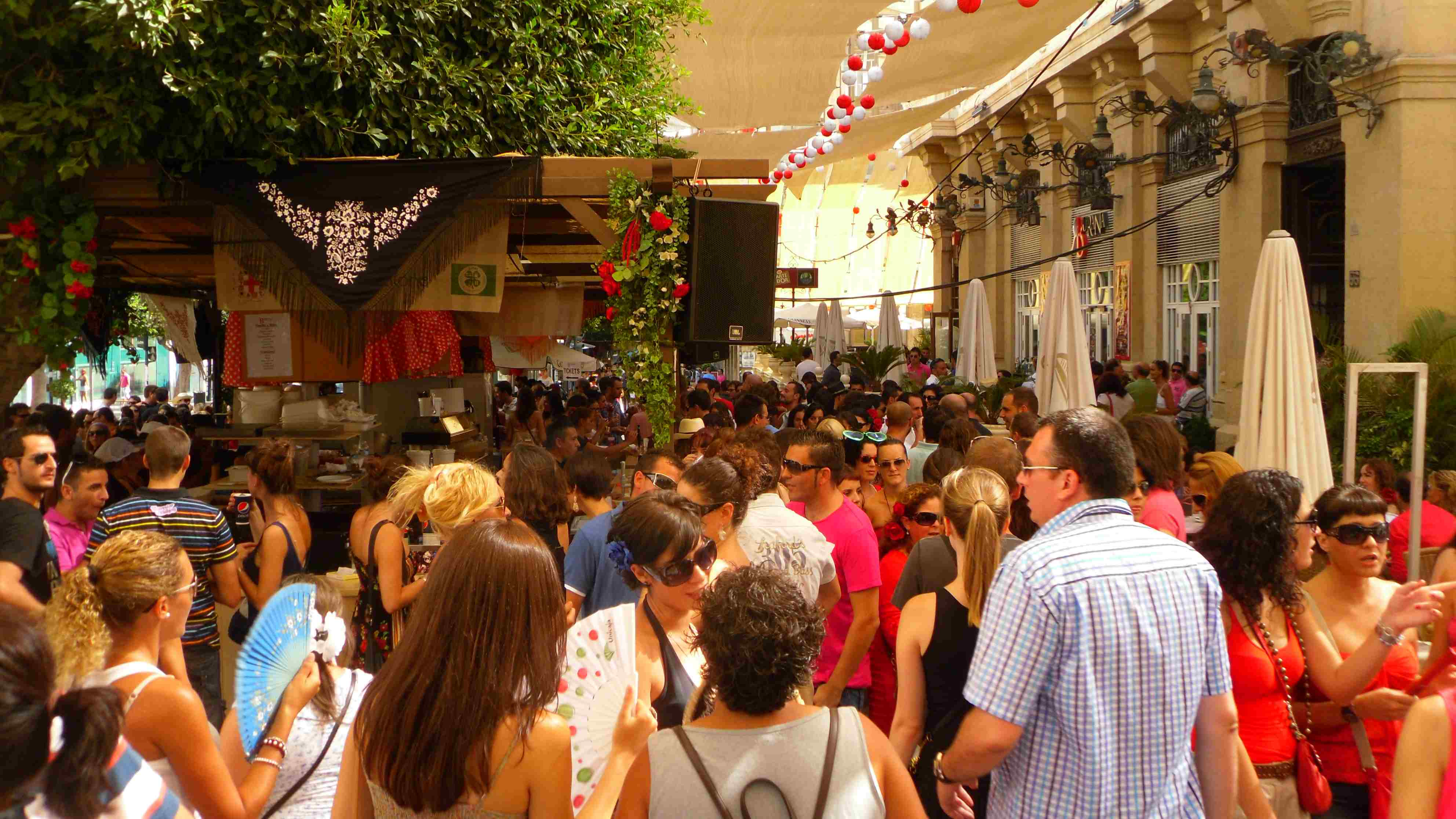 In der zweiten Augusthälfte findet die Feria statt. Es gibt Stierkämpfe, andalusische Musik- und Tanzdarbietungen, religiöse und sportliche Veranstaltungen.